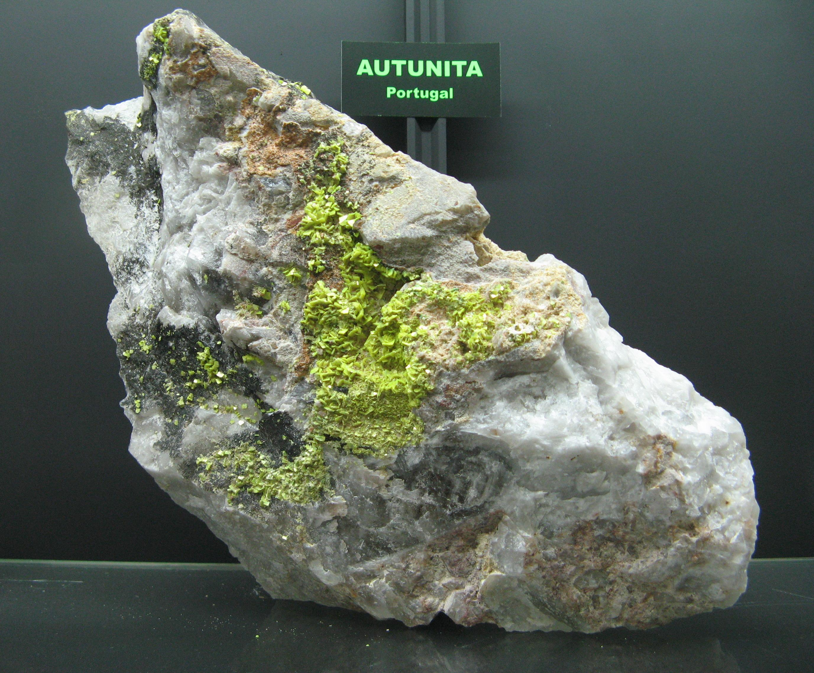 Autunita (Guarda - Portugal)